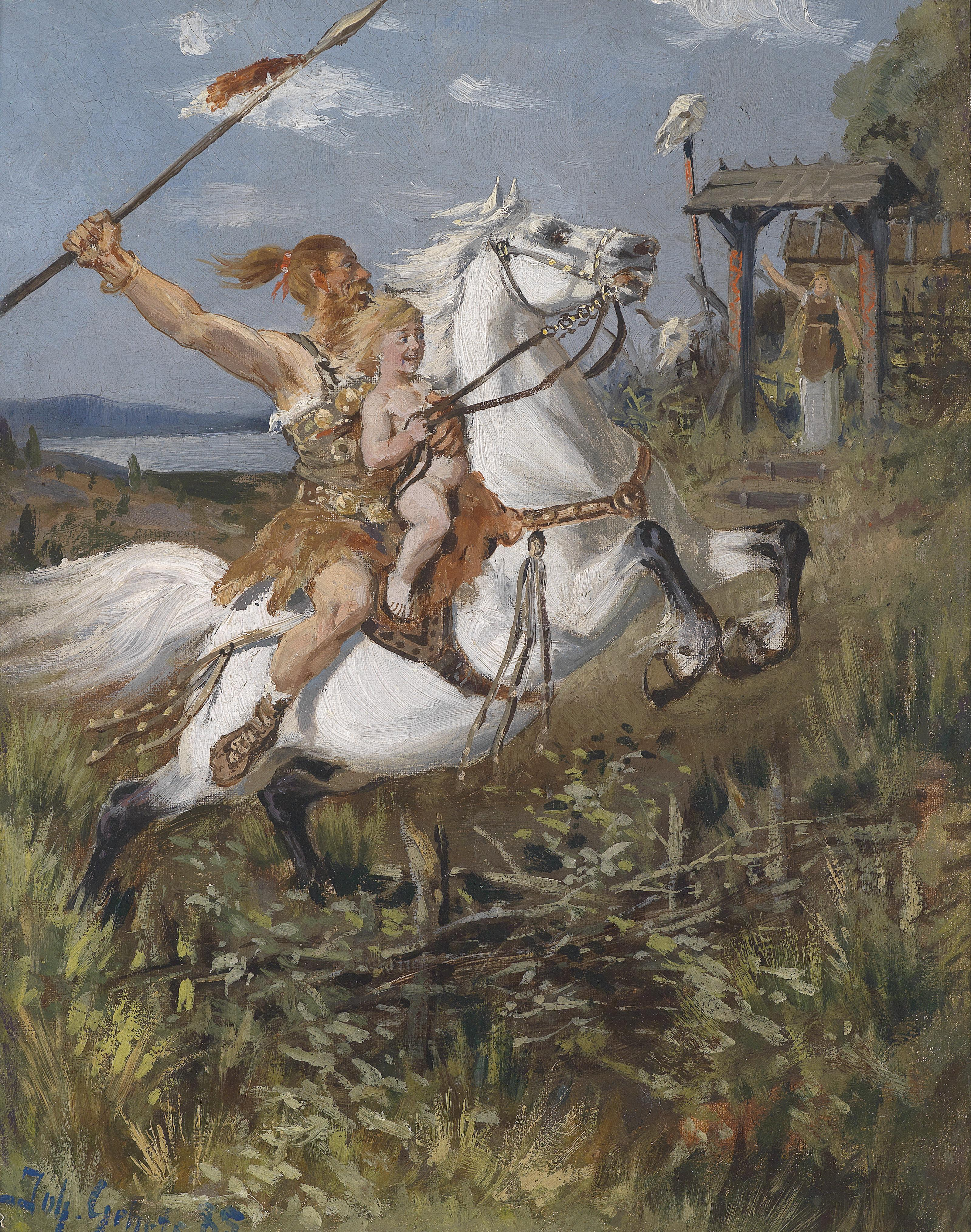 Ritt eines Hunnen, signiert, datiert Joh. Gehrts (18)85, Öl auf Karton, 32 x 25,5 cm